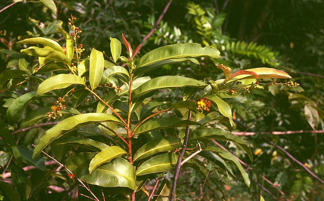 Campylospermum serratum, Ochnaceae - Kambodscha/Cambodia, bei den Stromschnellen (rapids) des Flusses Tek Chhou N Kampot (Prov. Kampot)